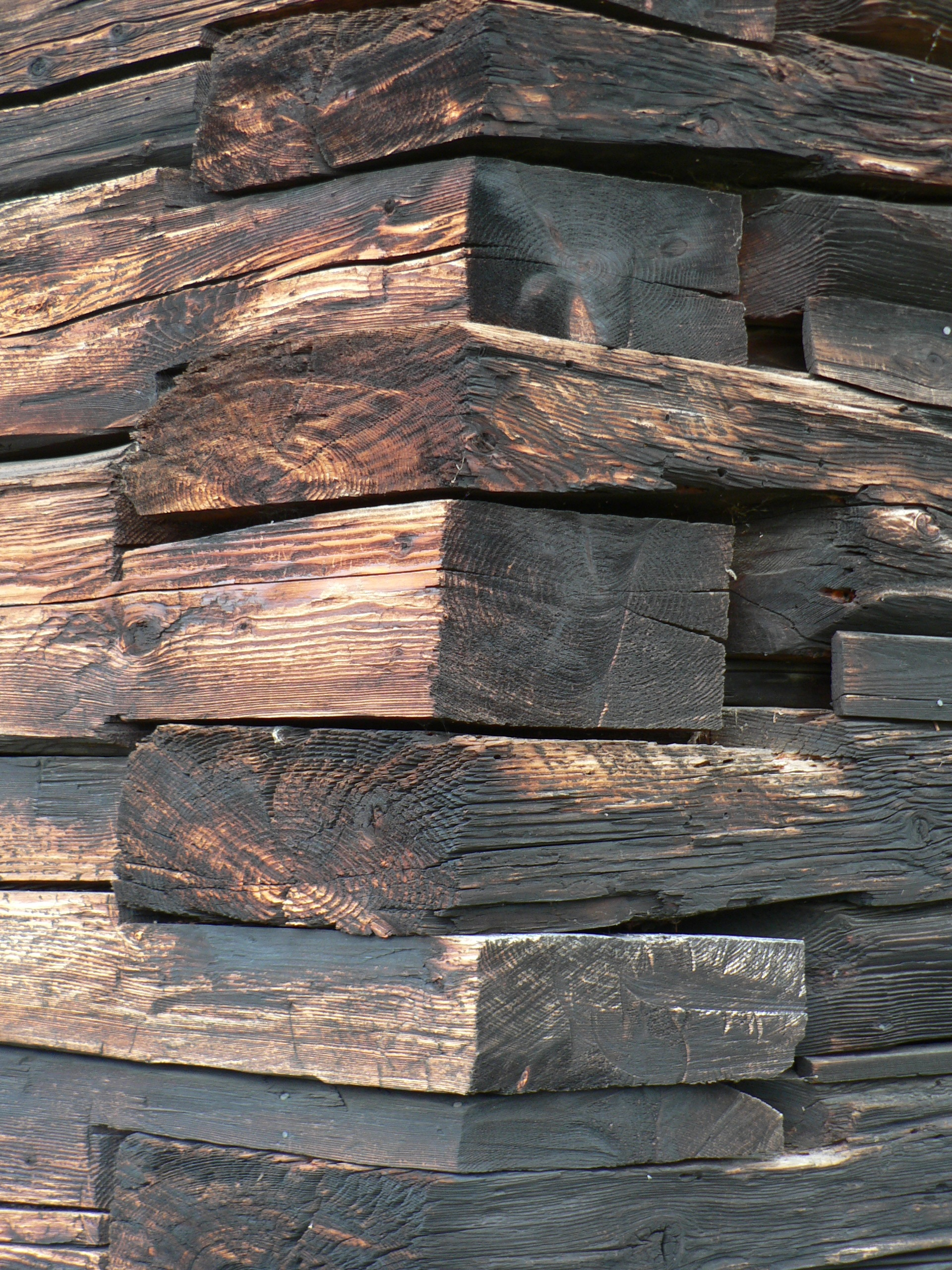 Kostel svatého Martina (Žárová), detail stavby